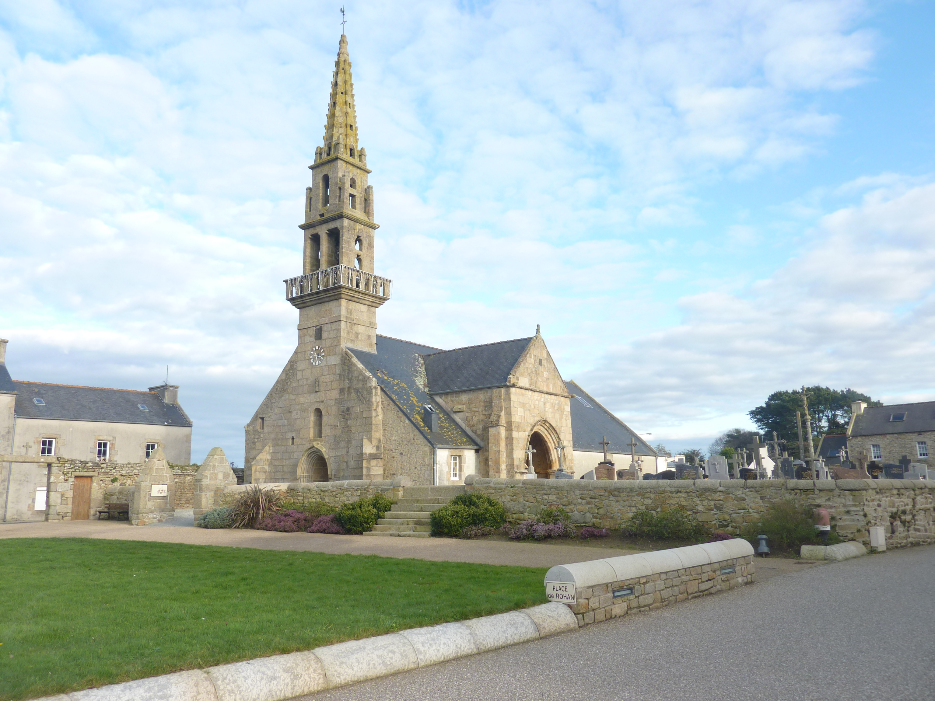 Coat-Méal : la place de Rohan